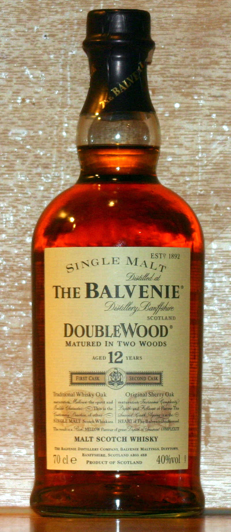 Balvenie Doublewood, 12 Jahre.